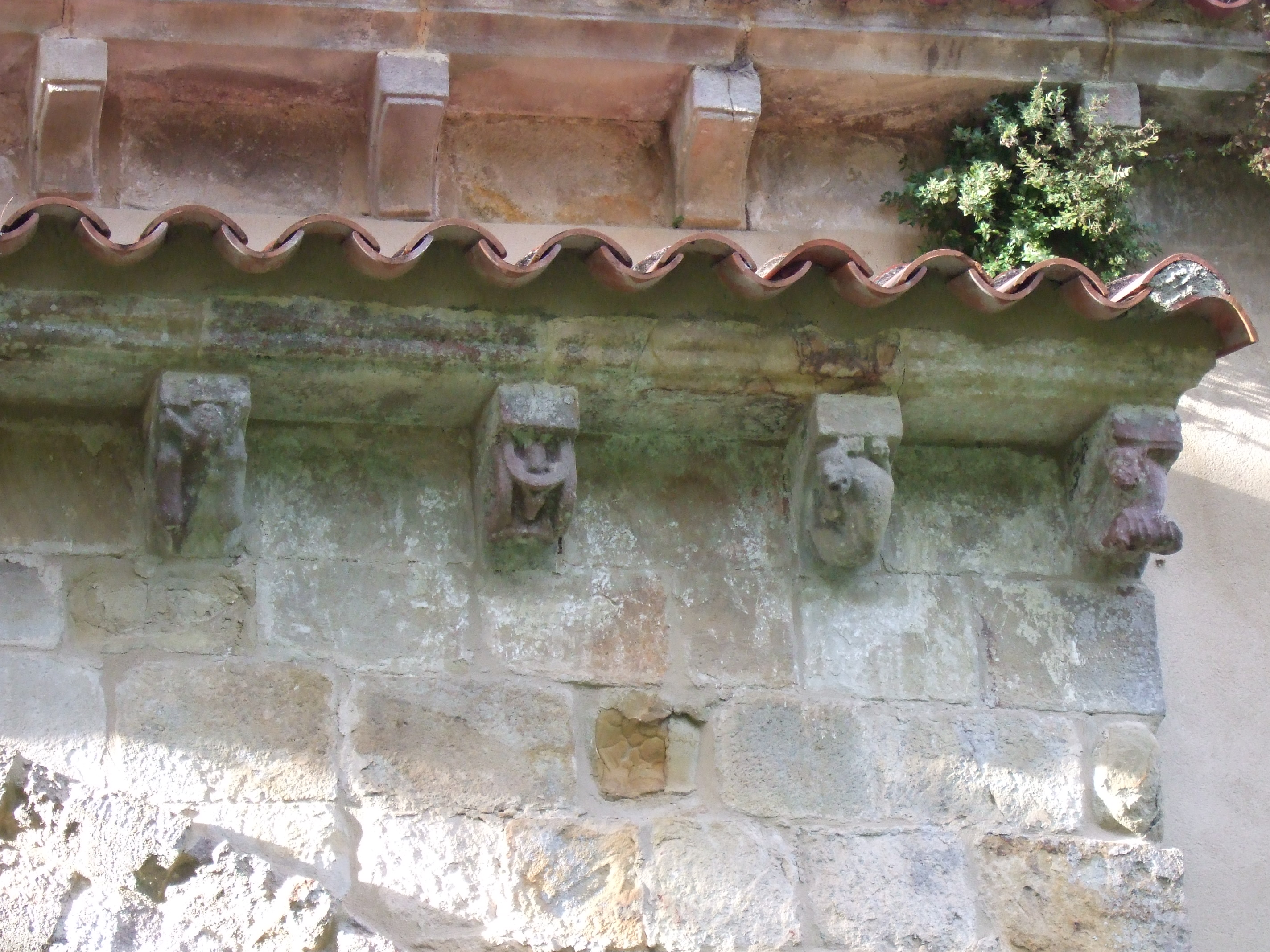 Monasterio de San Antolín de Bedón, concejo de Llanes, Asturias. - Portada sur - Canecillos